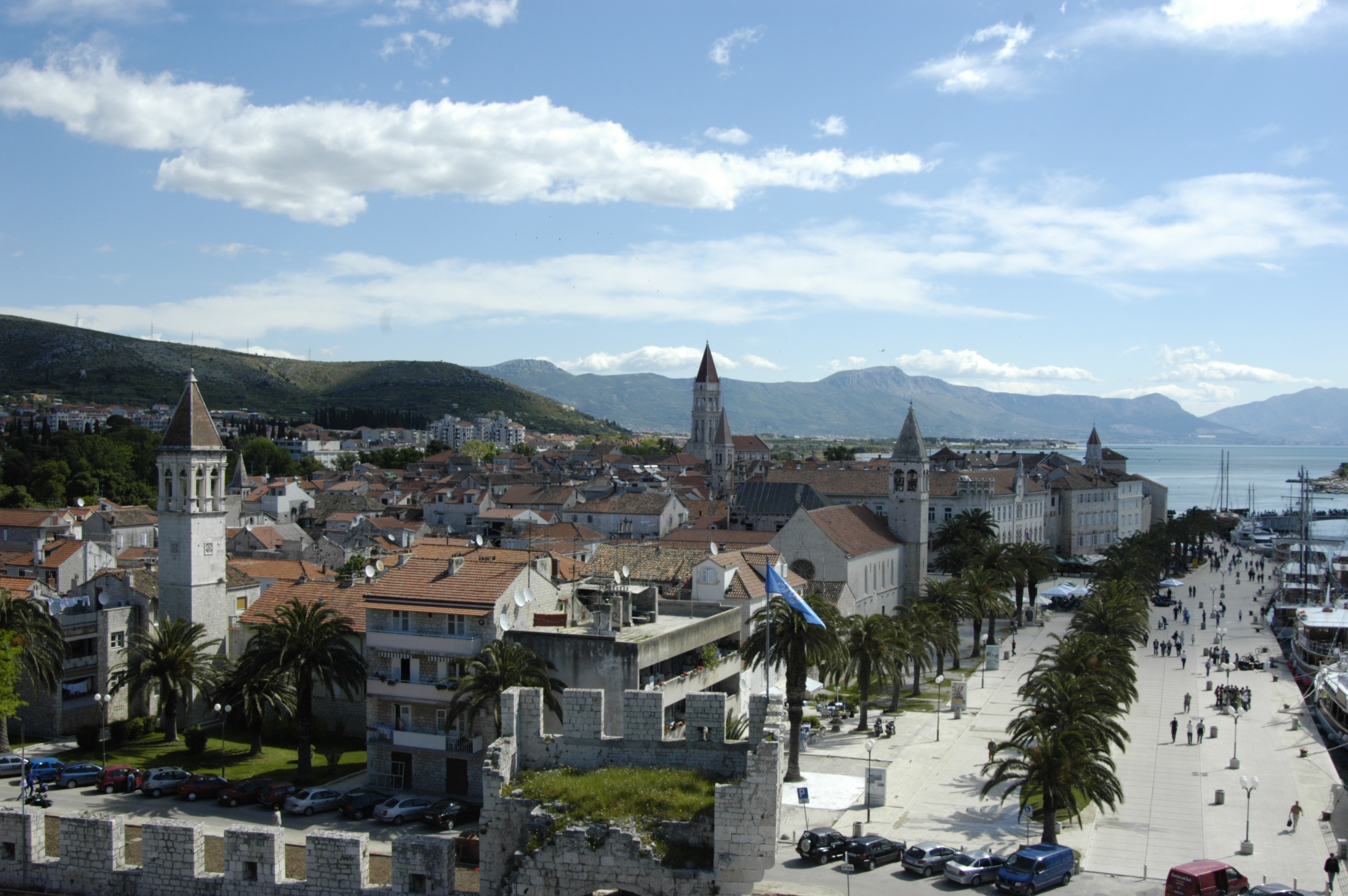 Панорама г. Трогир